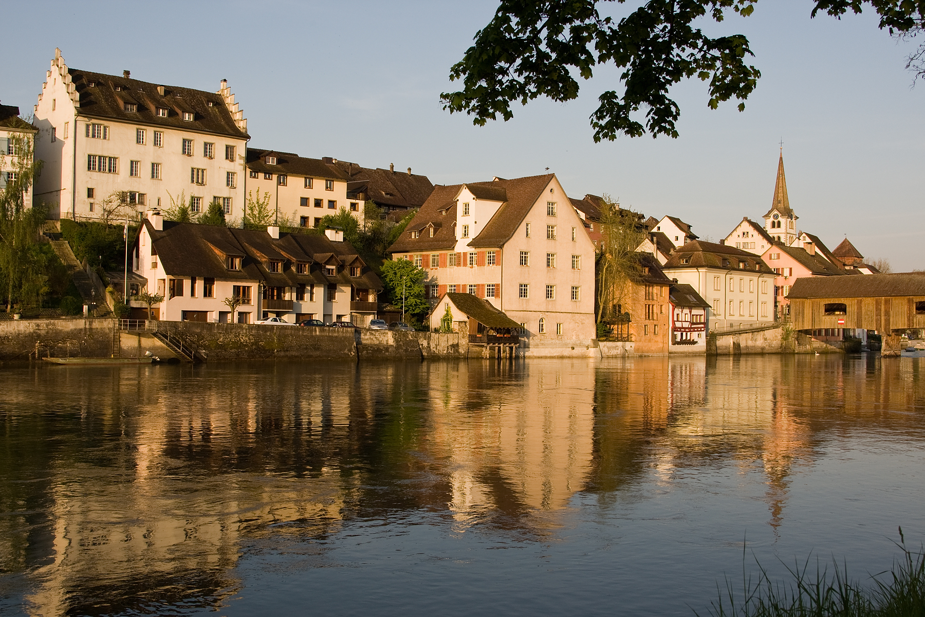 Diessenhofen, Altstadt - im Morgenlicht